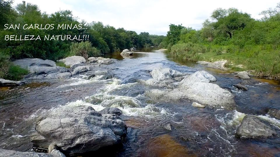 Union del Rio Jaime y el Arroyo Noguinet, San Caros Minas.